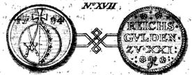 Kurfürstlich-sächsischer Reichsgulden von 1584